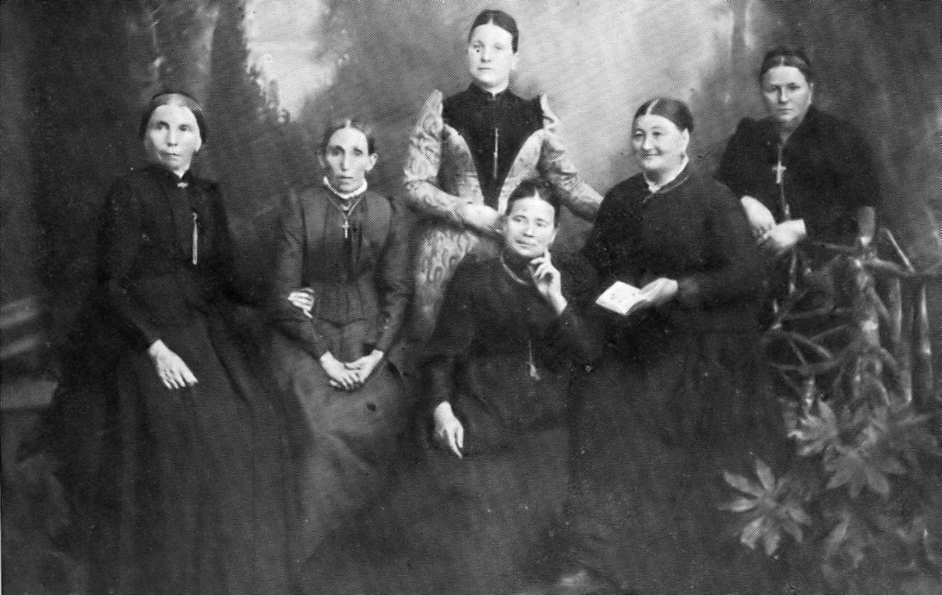 Ältestes Bild des Beueler Damenkomitee von 1824.